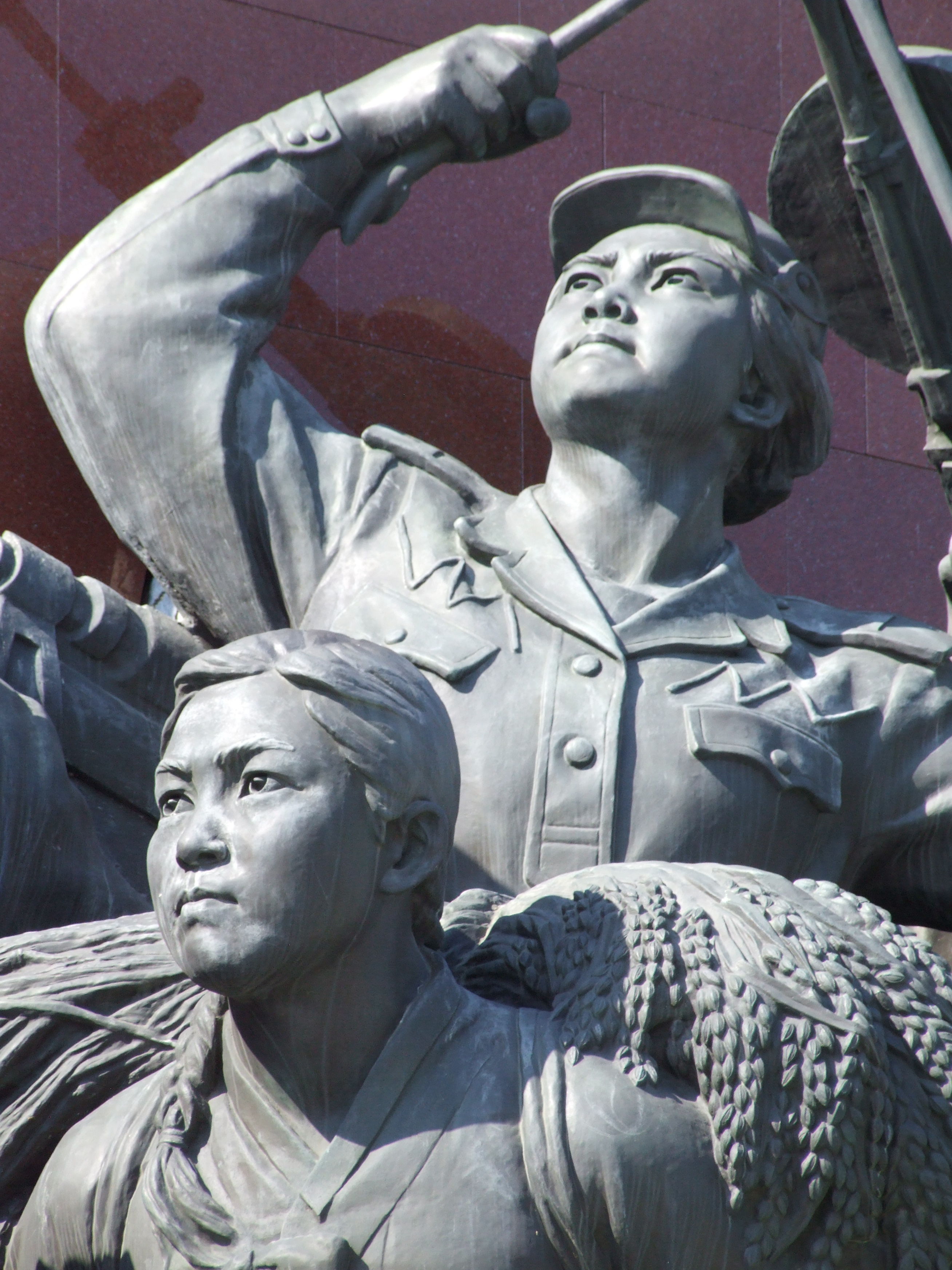 Großmonument Mansudae